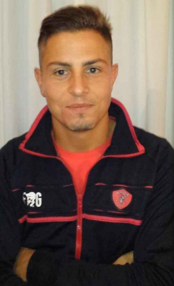 Il calciatore italiano Umberto Eusepi al Perugia nella stagione 2013-14.